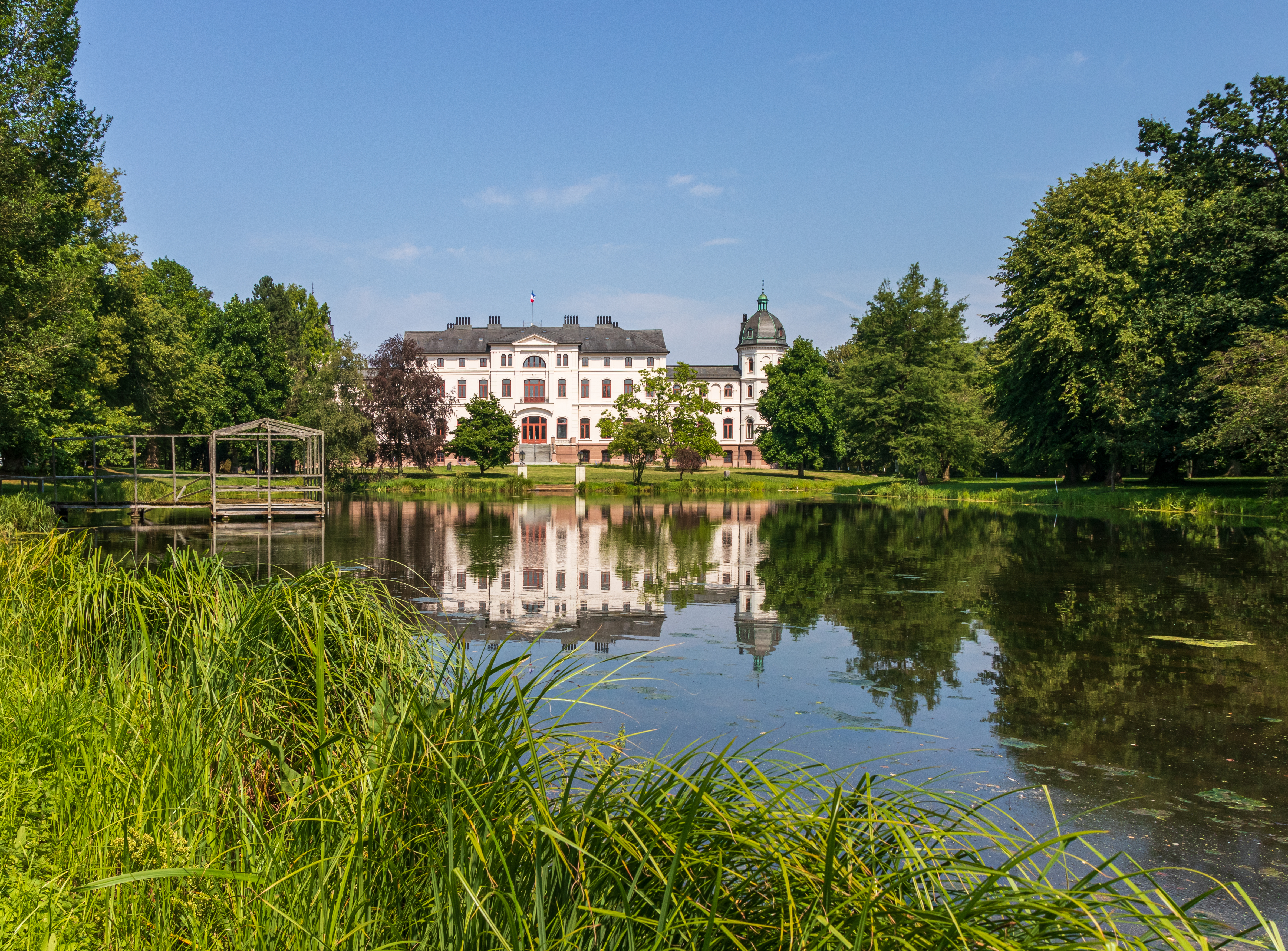 Gut Salzau – Haupthaus, Gartenfassade